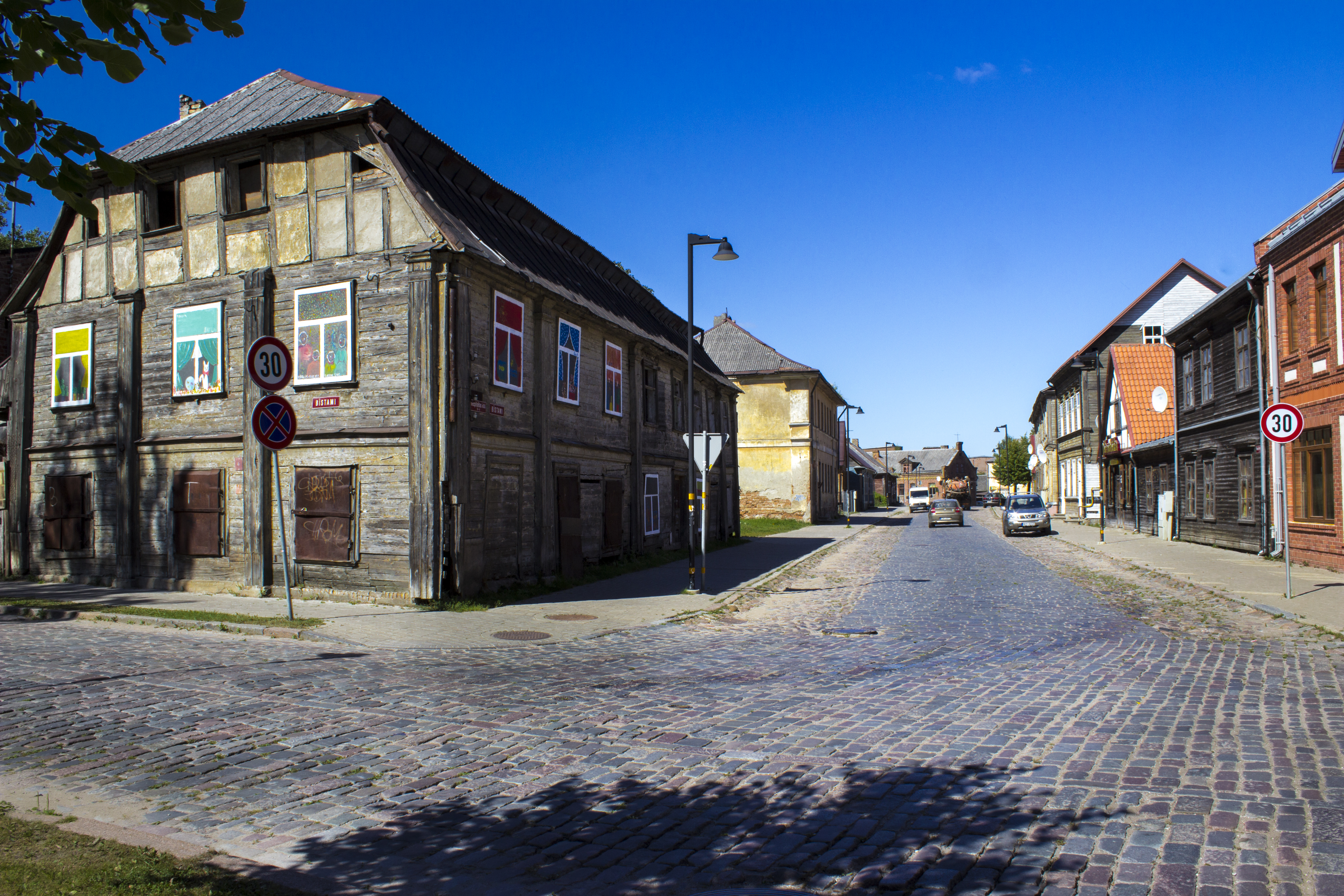 Vecpilsētas iela, Jelgava